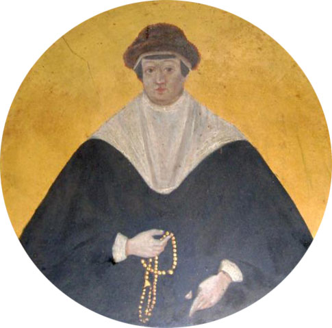 Беларуская (тарашкевіца): Партрэт Ганны Алаізы Хадкевіч (Hanna Ałaiza Chadkievič) з князёў Астроскіх (Astroski)